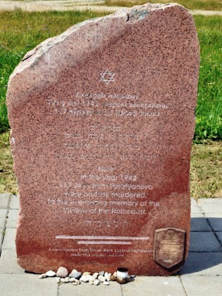 Памятник на месте убийства евреев - узников гетто в Парафьяново. Установлен в июле 2005 года.